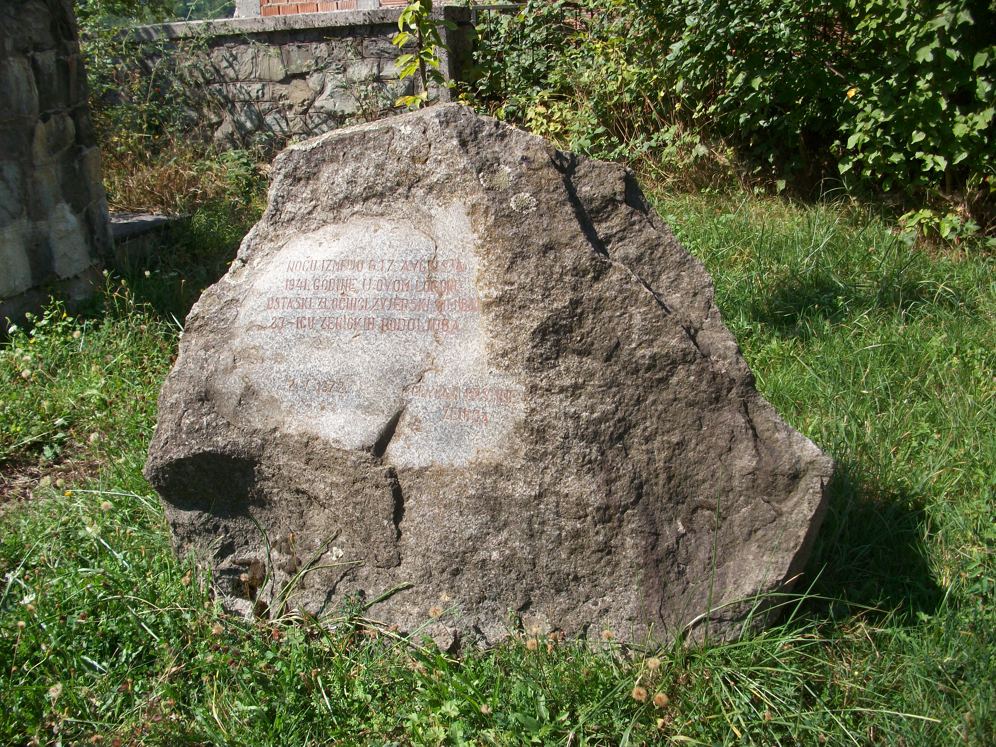 Spomenik u bivšem koncentracionom logoru Kruščica u Vitezu, Bosna i Hercegovina